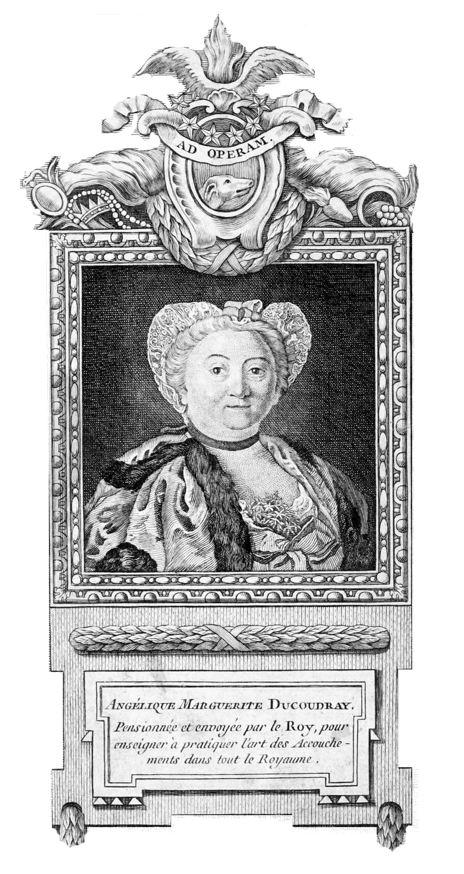 Portrait Angelique du Coutray